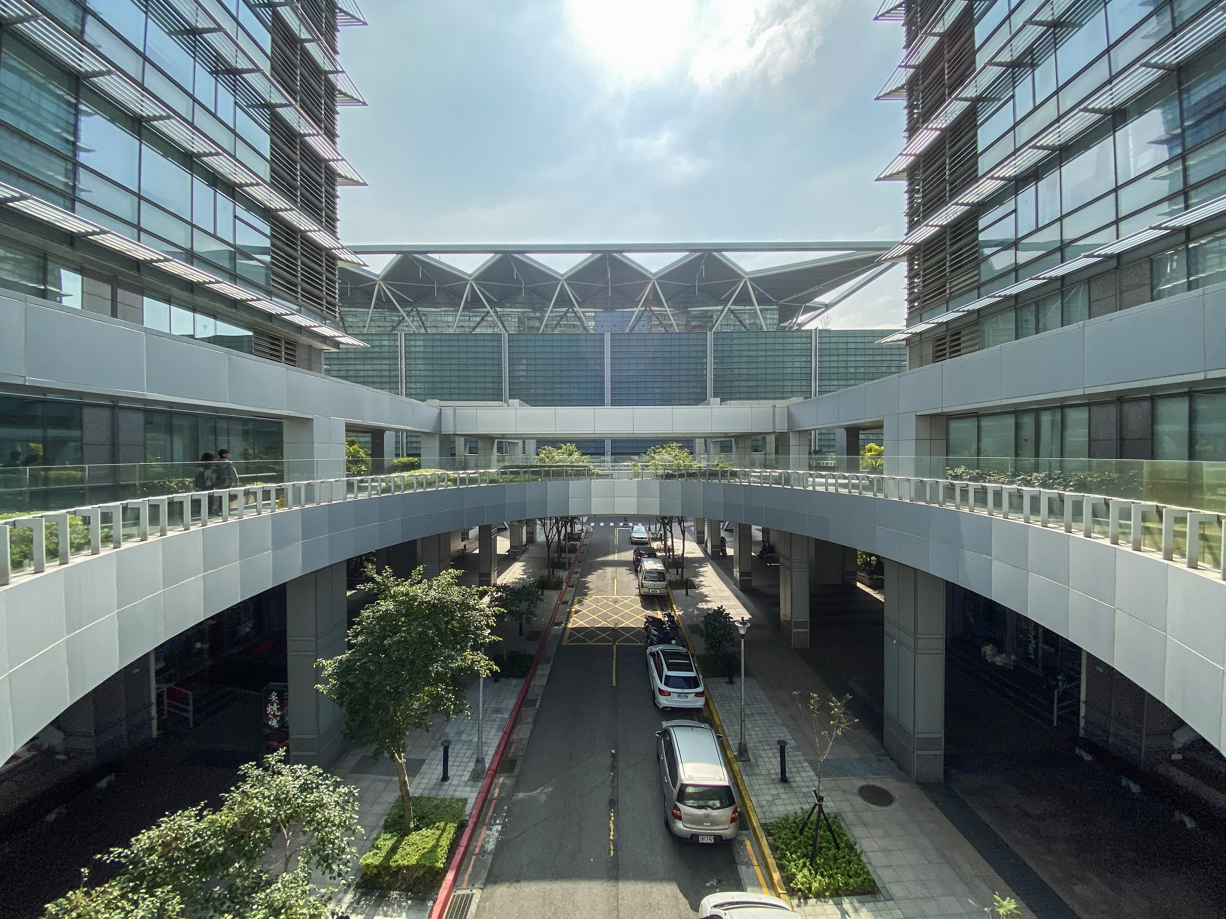 Nankang Software Park Phase 3 Void